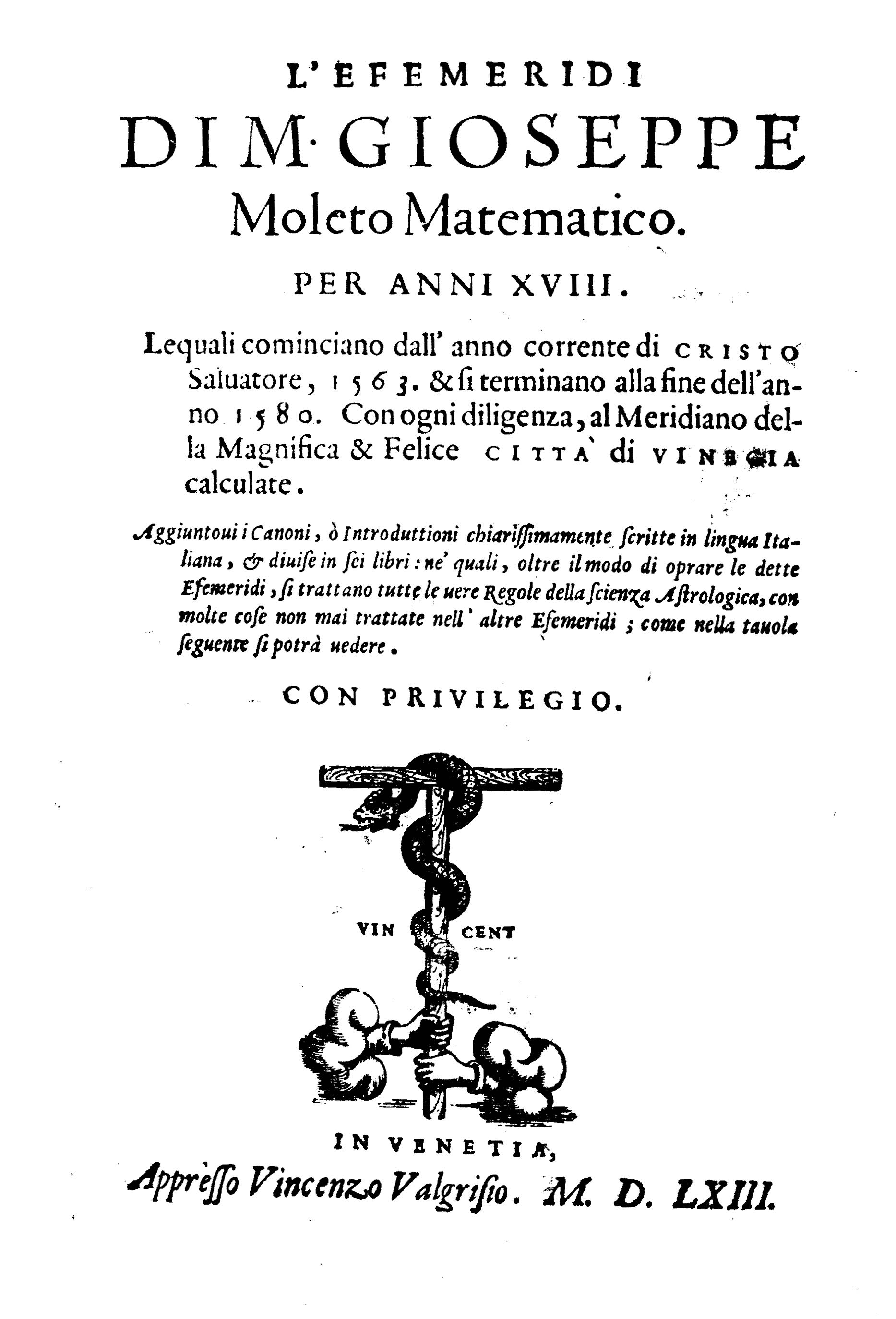 L' efemeridi di m. Gioseppe Moleto matematico. Per anni 18. Le quali cominciano dall'anno corrente di Christo Saluatore, 1563. & si terminano alla fine dell'anno 1580. Con ogni diligenza, al meridiano della magnifica & felice città di Vinegia calculate. Aggiuntoui i canoni, ò introduttioni .... - In Venetia : appresso Vincenzo Valgrisio, 1563. - [16], 240, [504] p. : ill. ; 4º .